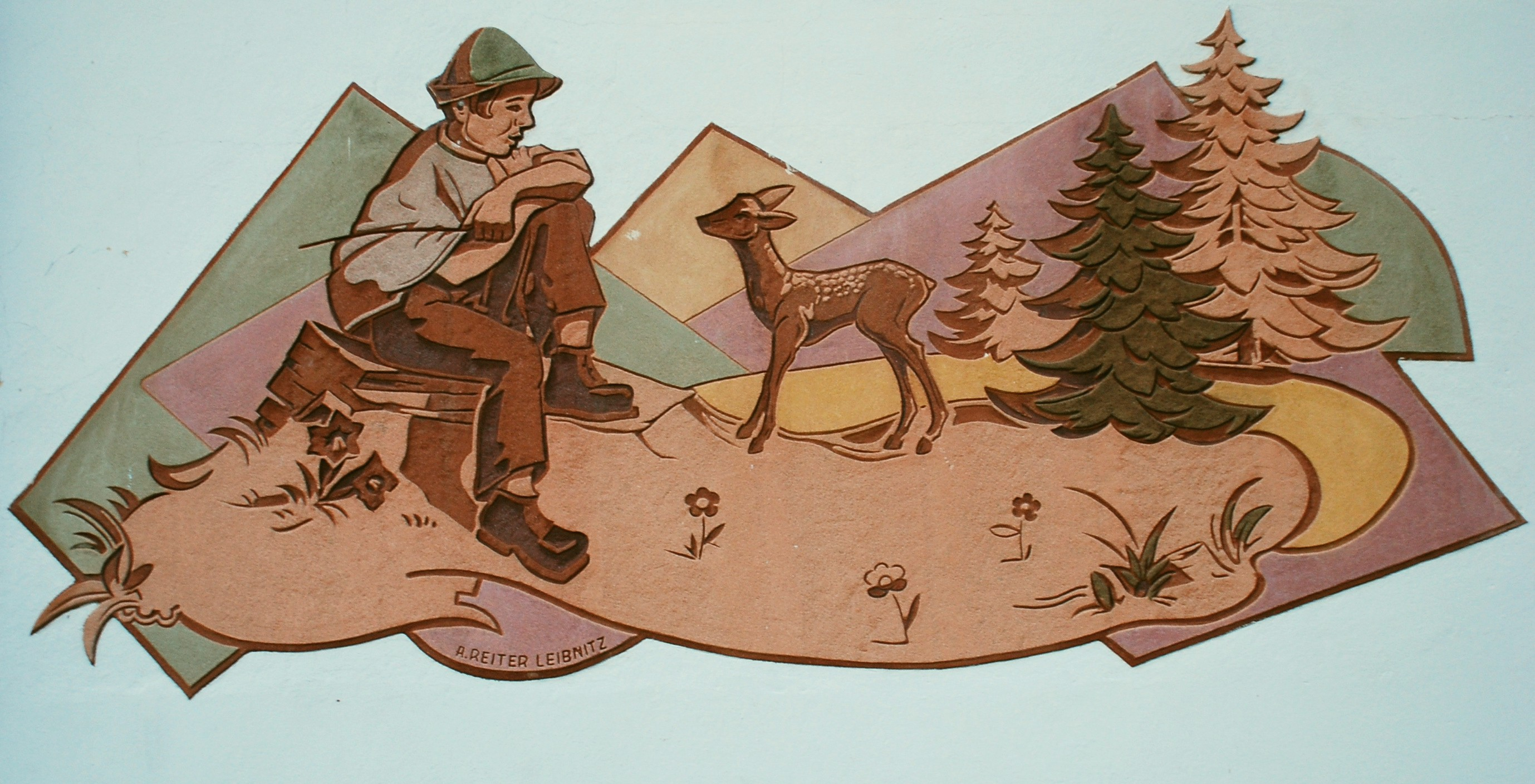 Hirtenszene auf der Volksschule Kloster